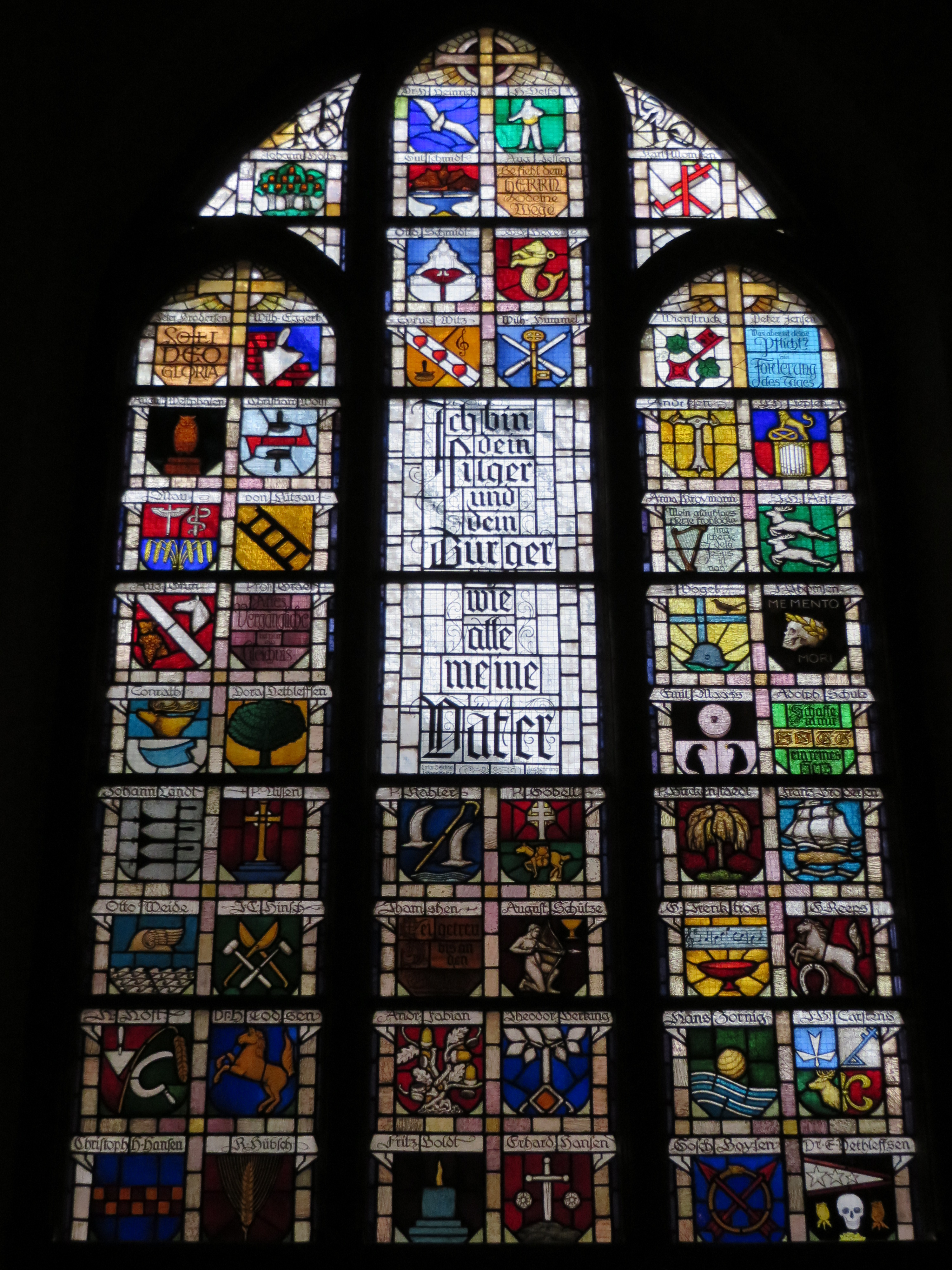 Wappenfenster der Nikolaikirche, Bild 01